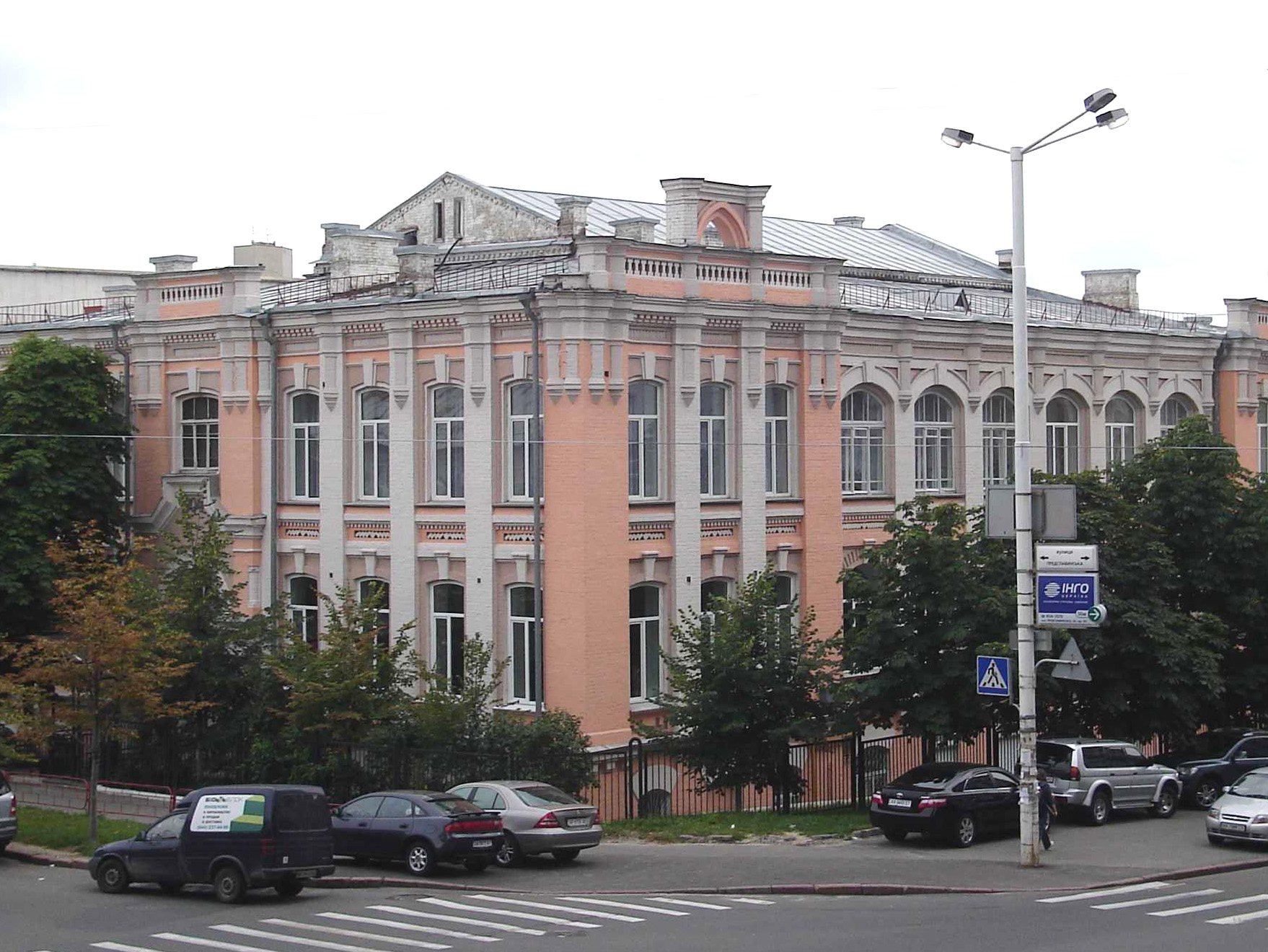 Школа-гимназия № 56 в Киеве